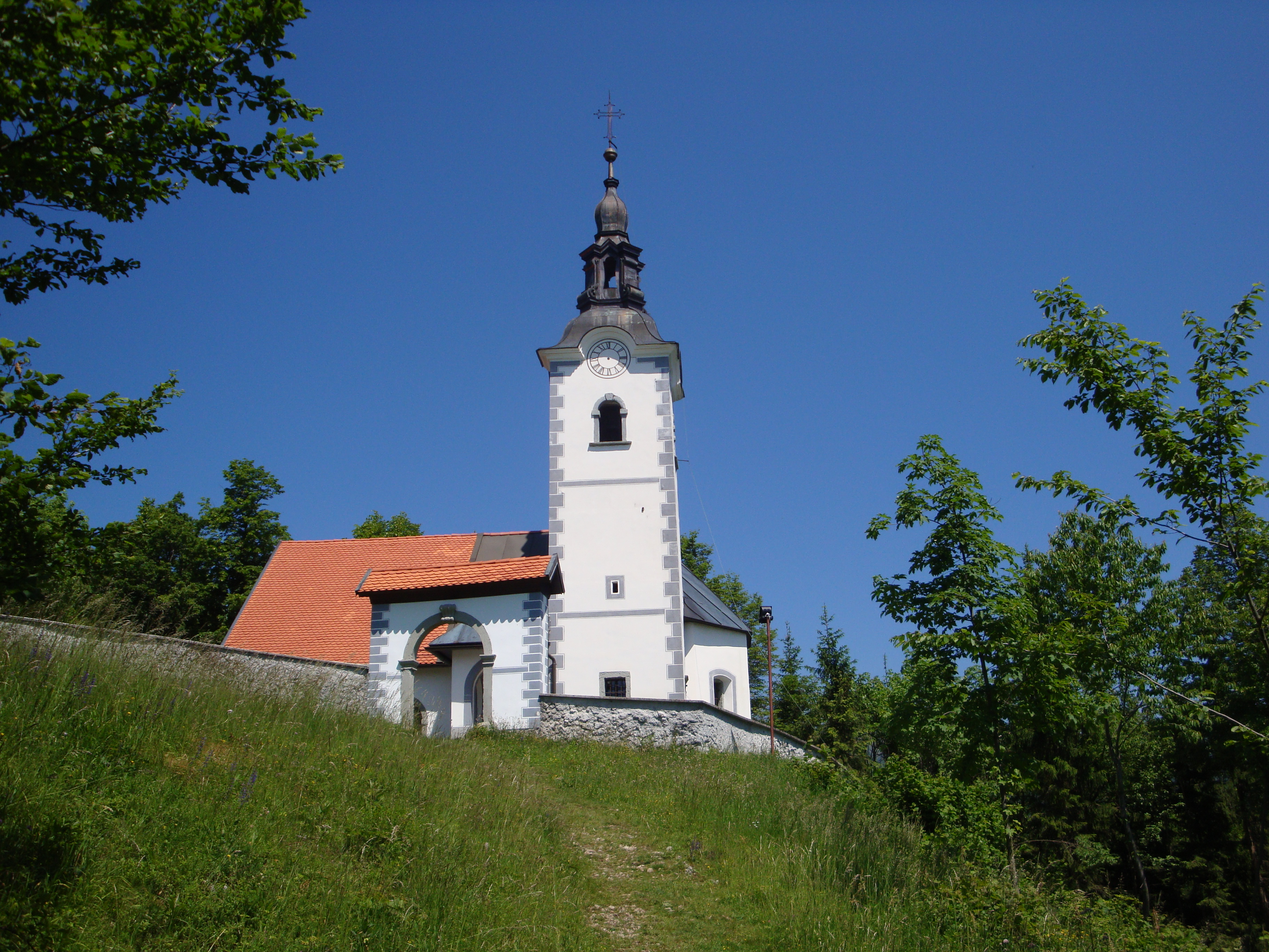 Cerkev Sv. Štefana na Štefanji gori.